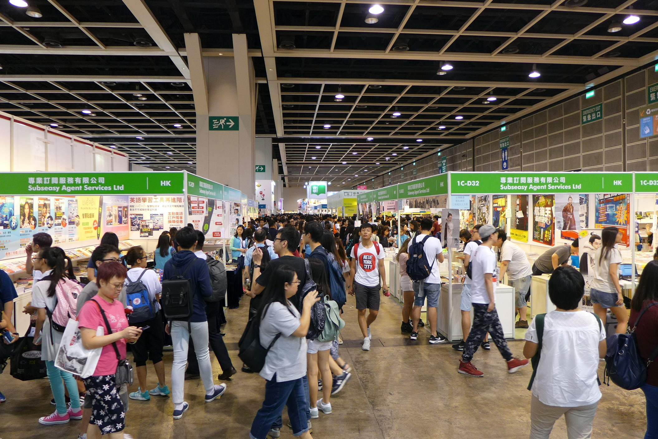 Hong Kong Book Fair 2016